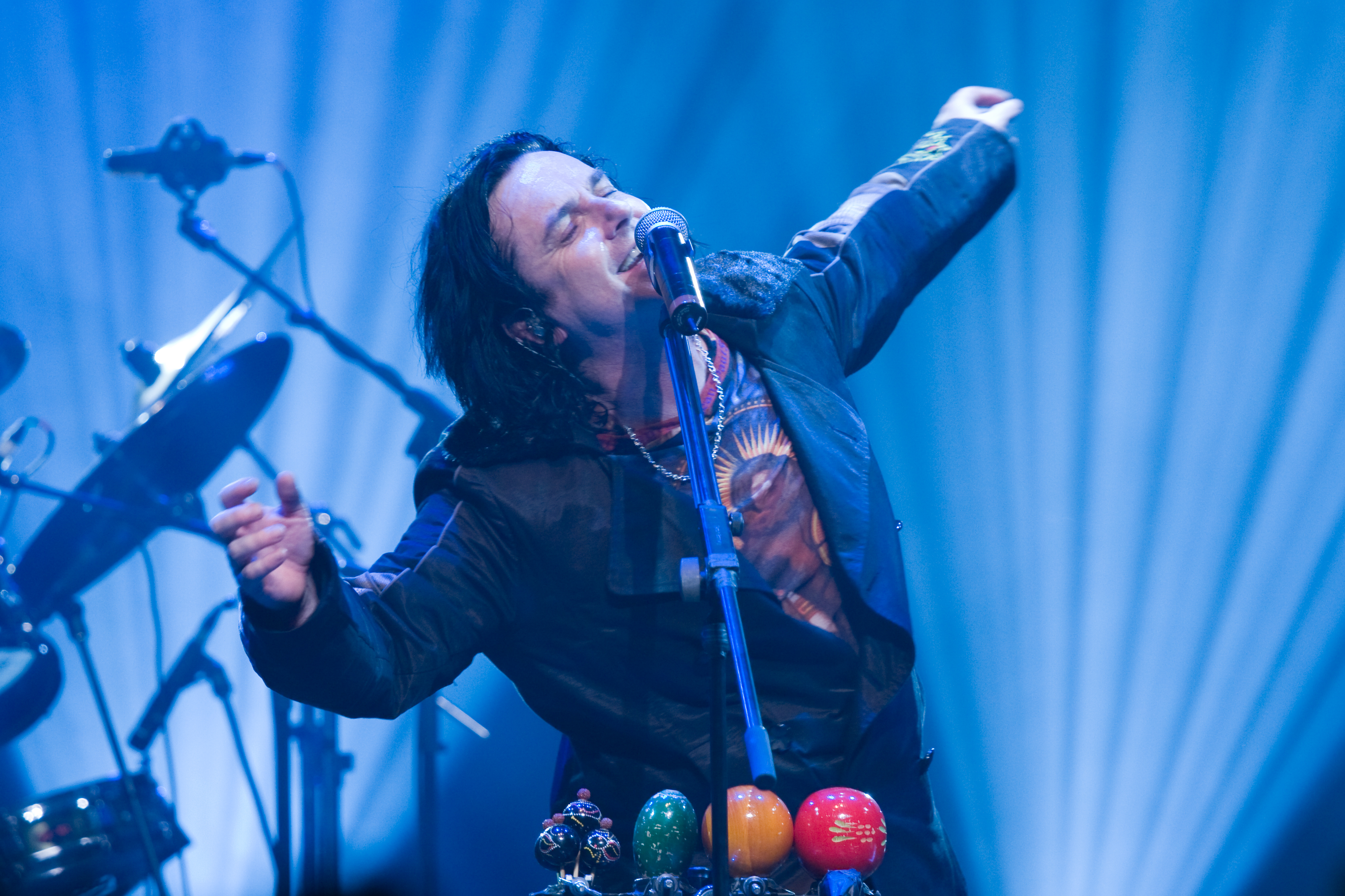 Steve Hogarth (h) at Marillion Weekend 2009 - Montreal Canada